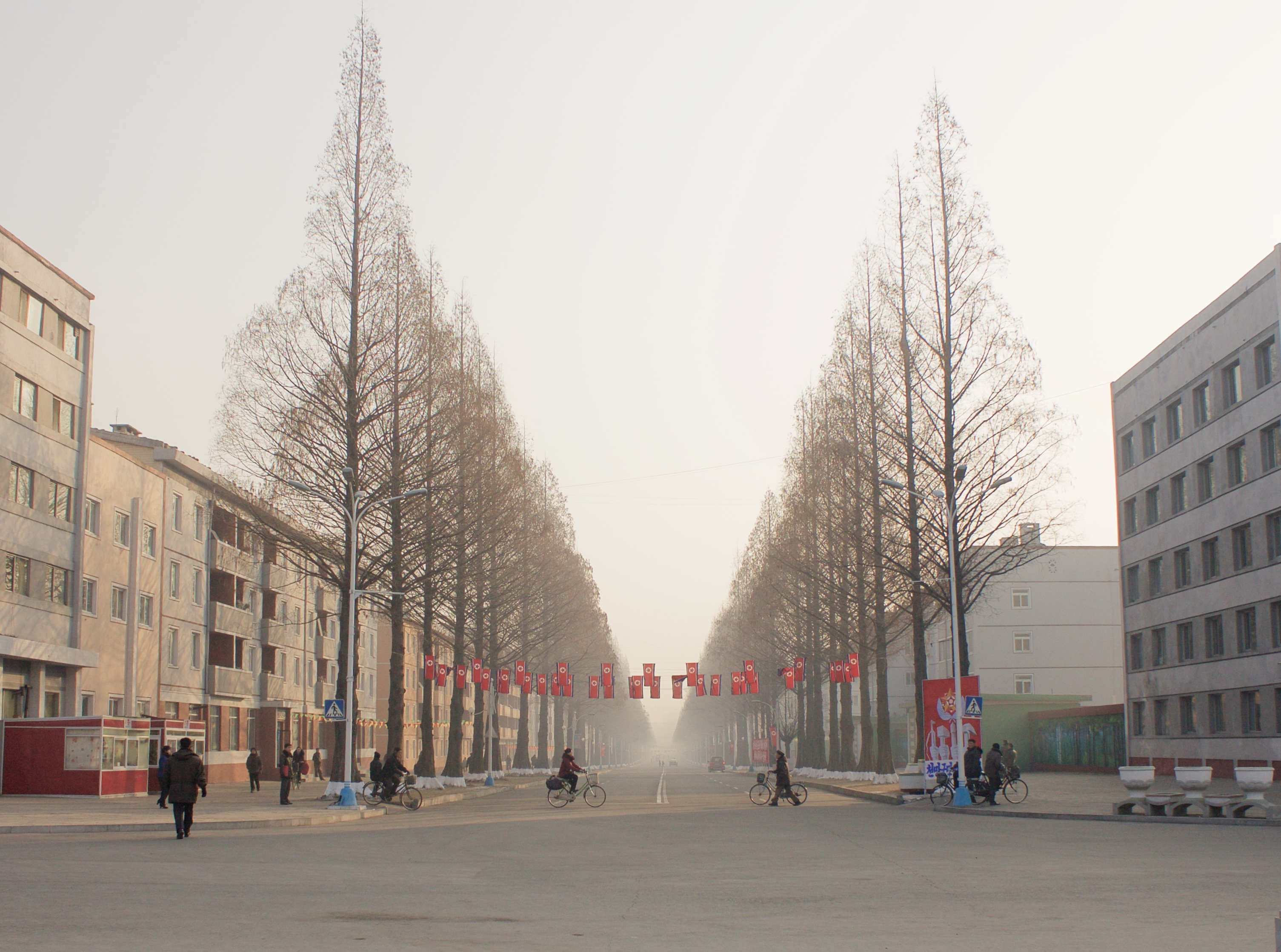 Flags & Trees